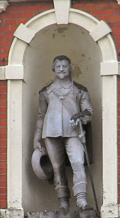 Kong Christian IV, statue af Bertel Thorvaldsen på Rådhuset i Kristianstad